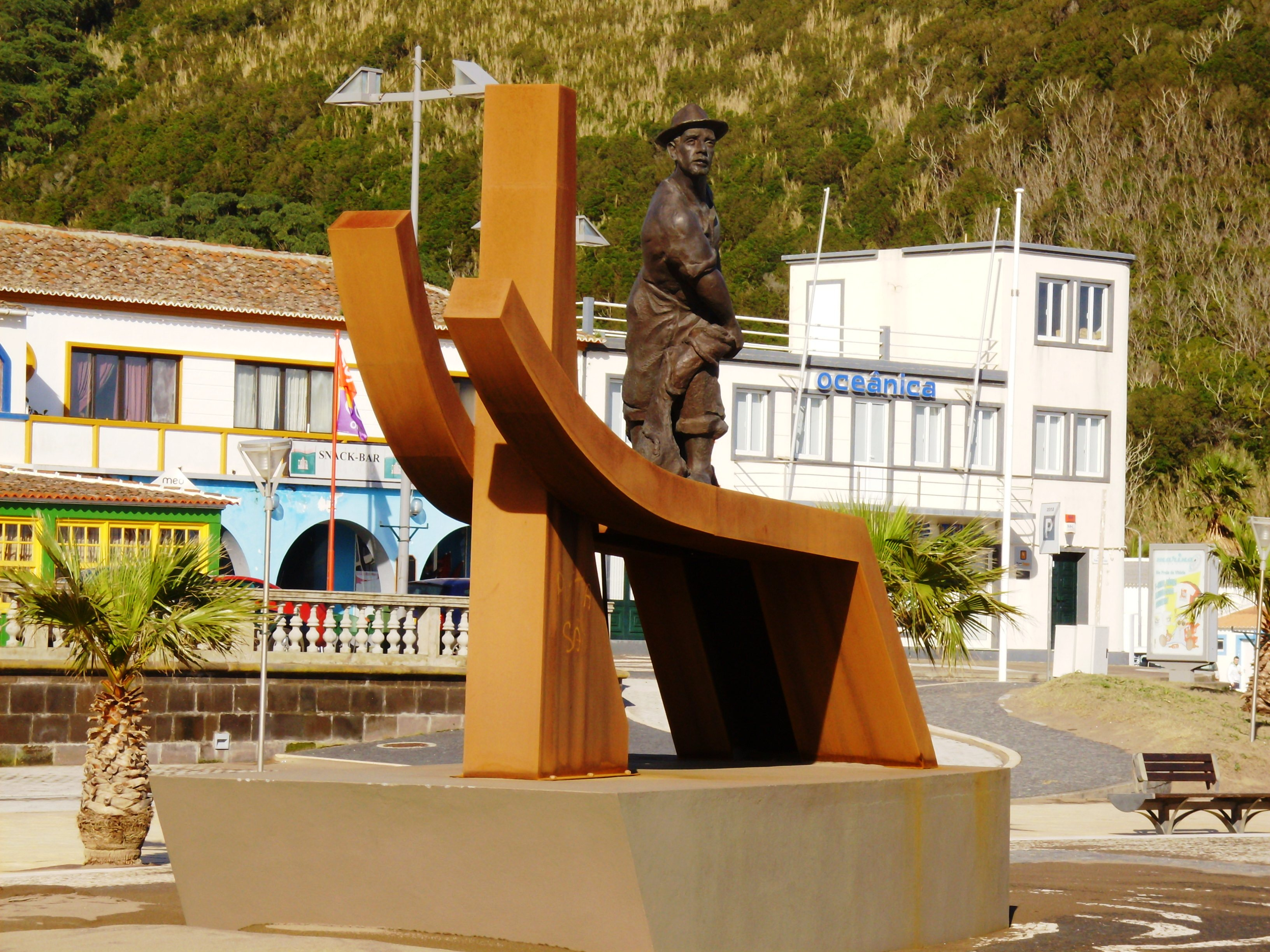 Monumento aos Homens do Mar, Praia da Vitória, Ilha Terceira, Açores.